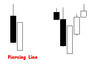 Analisi Tecnica, Candele giapponesi, Piercing Line.